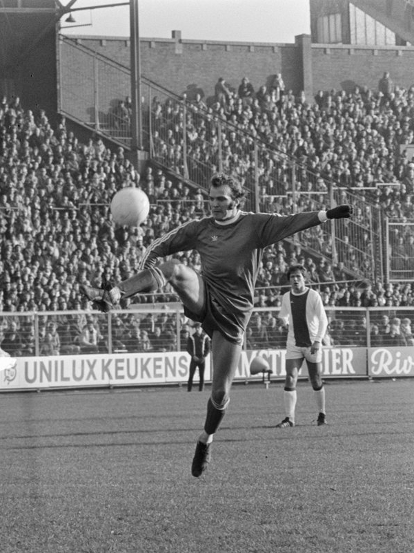 Ajax tegen PSV 1-4, Willy van de Kerkhof omspeelt Schrijvers voor de 2e maal.